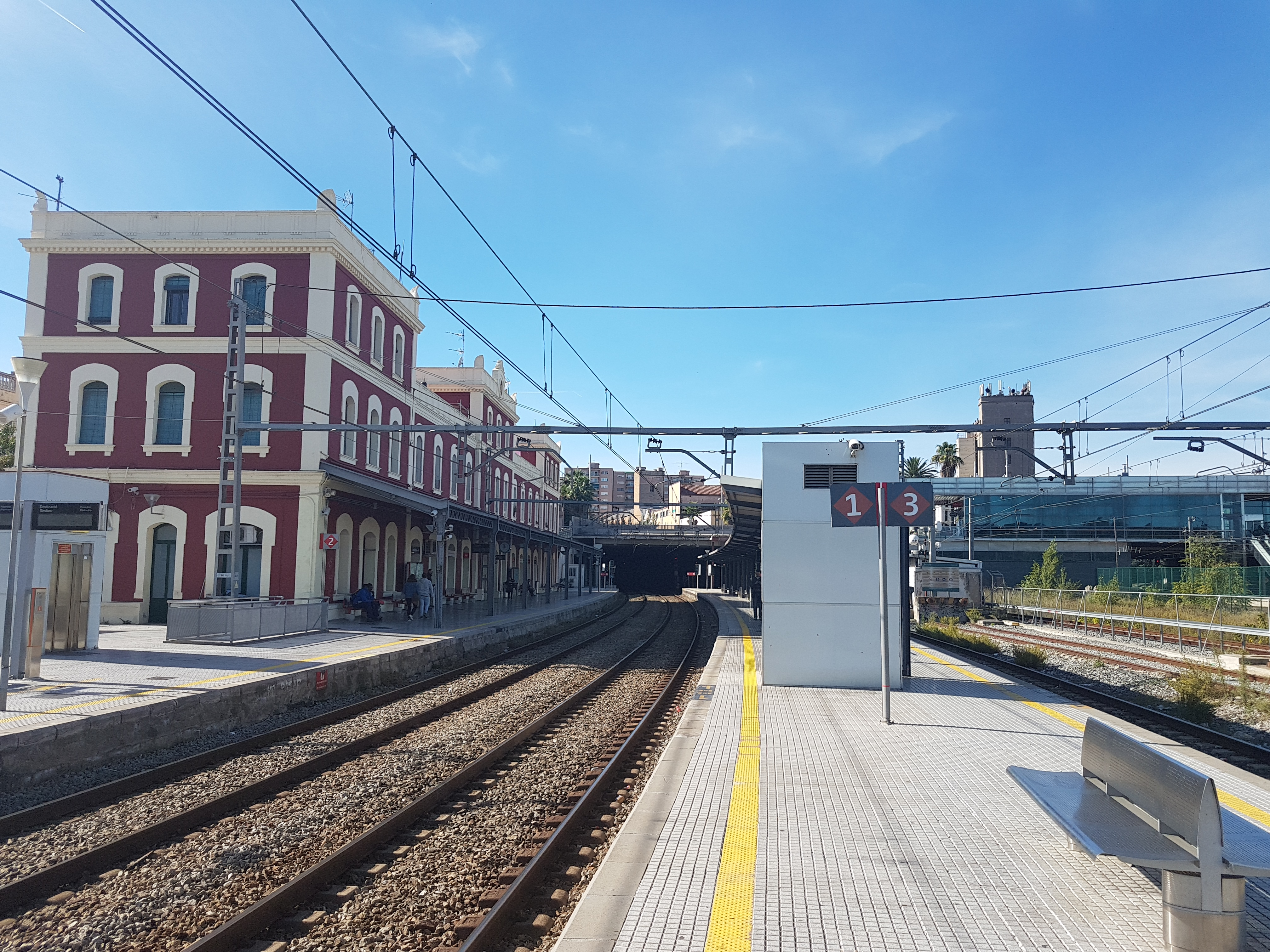 Estació de Martorell de la línia Barcelona-Vilafranca-Tarragona